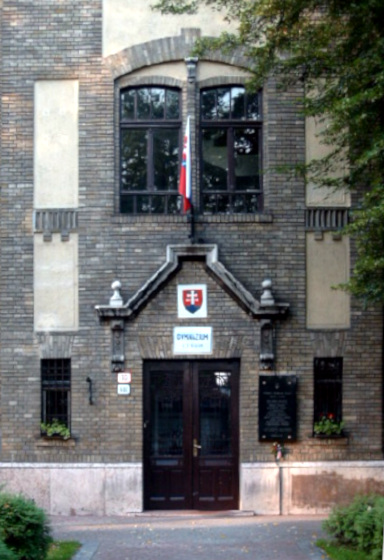 Komárno / Révkomárom (SK), Ľudovít-Šulek-Gymnasium.